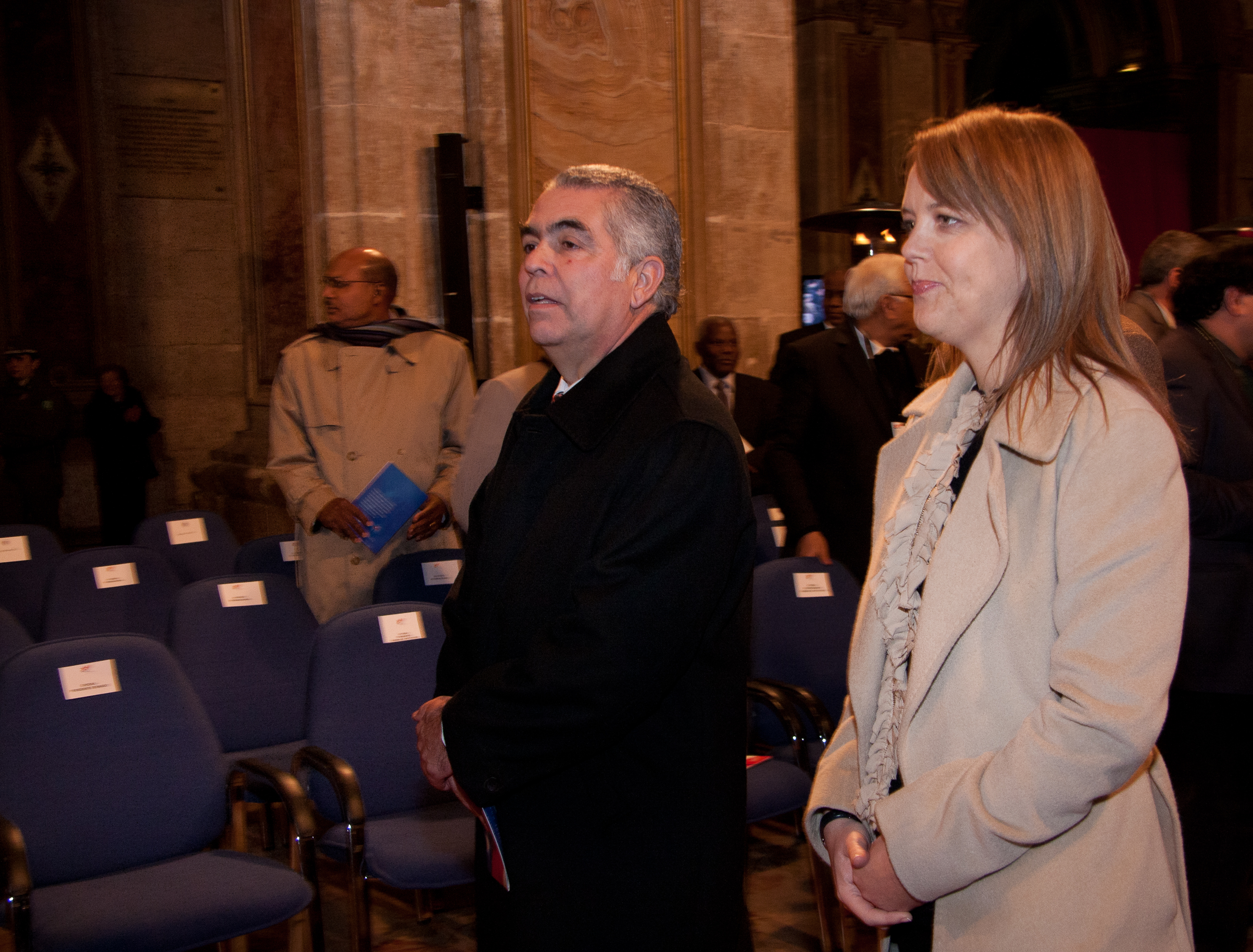 Una promesa solemne de los parlamentarios para poner todo el empeño “en hacer de Chile una Patria de hermanos, donde cada uno tenga pan, respeto y alegría, donde reine la paz, la justicia, la solidaridad, y para que Chile sea una nación bendecida por Dios, tierra de encuentro y esperanza” fue uno de los momentos culminantes del Te Deum Ecuménico, el segundo de los eventos de conmemoración del Bicentenario del Congreso Nacional, realizada este domingo 3 de julio del 2011.